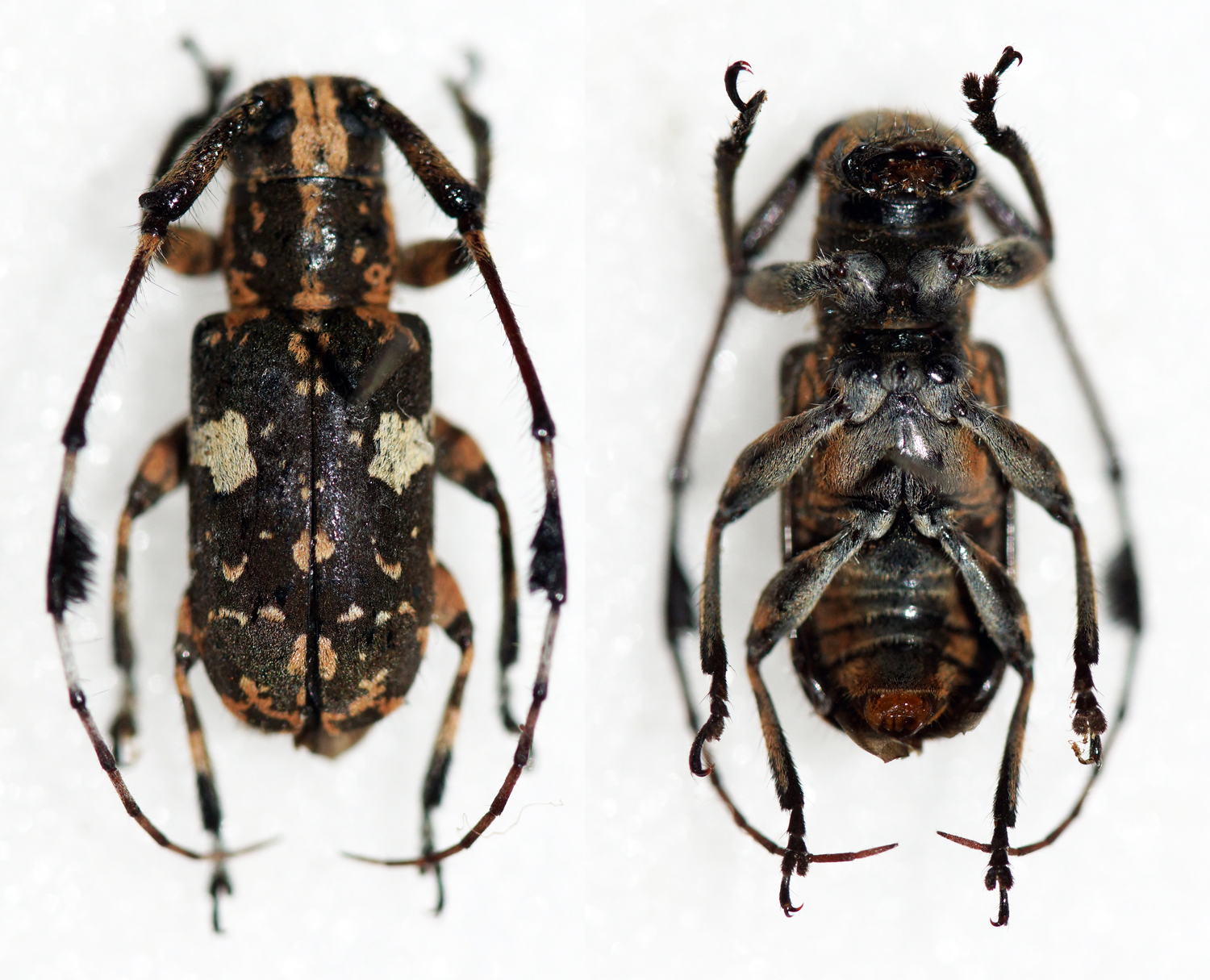 Heller,1923 Sex: Male Data: 05-2014 - Belance - Nueva vizcaya - North Luzon - Philippines Size: 10mm